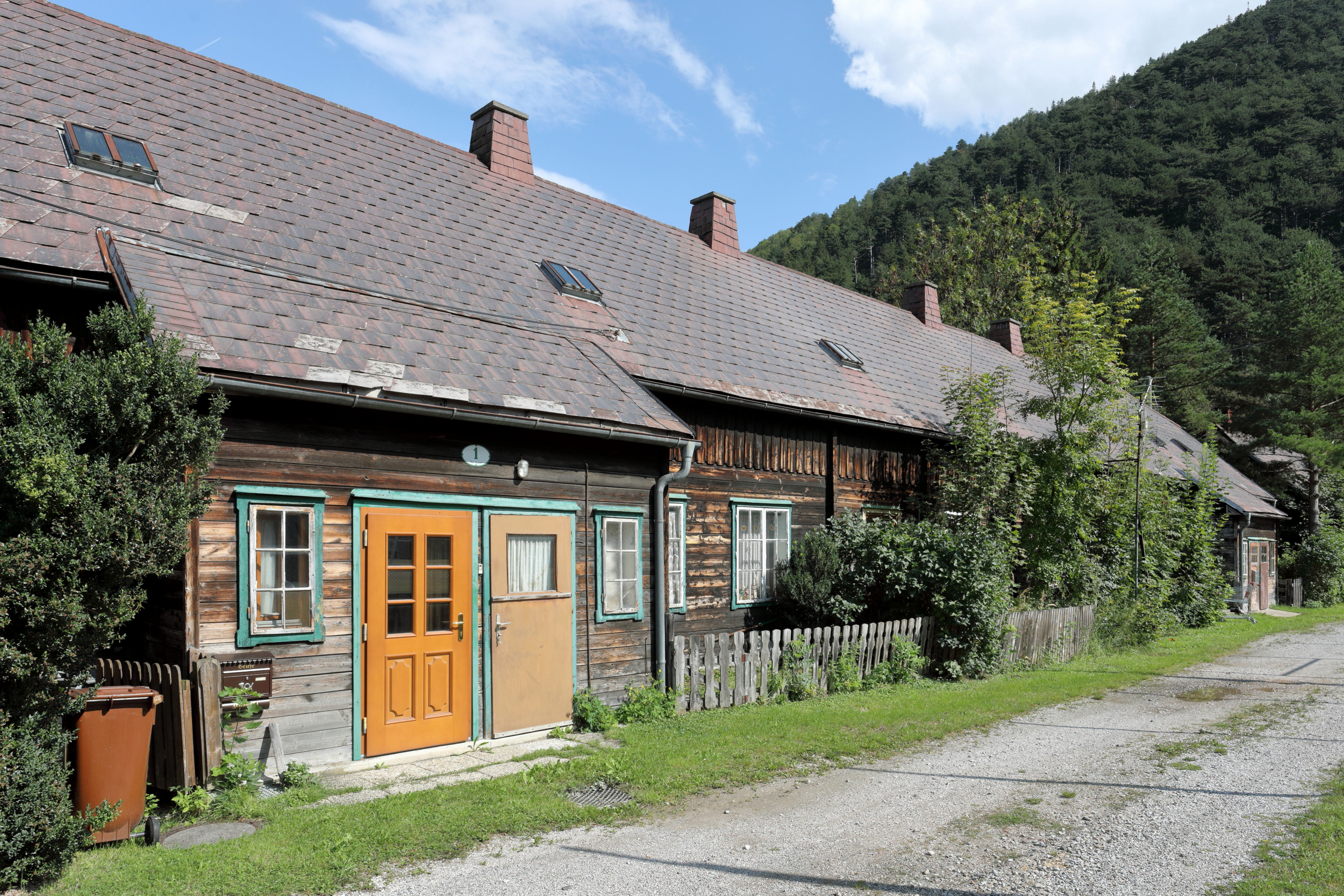 Der nordwestliche Wohnblock der ehemaligen Bergknappensiedlung in der niederösterreichischen Marktgemeinde Puchberg am Schneeberg.